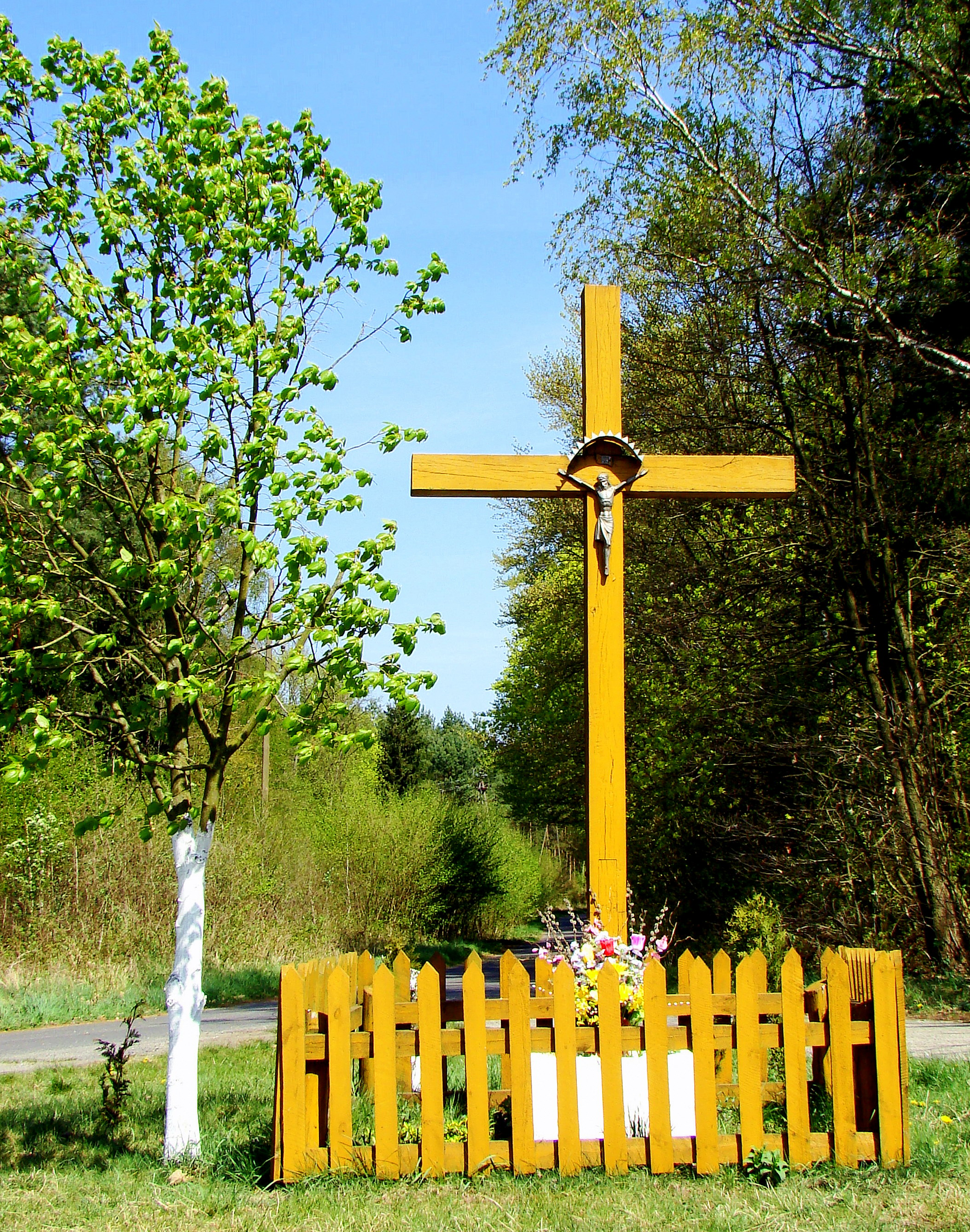 Nowa Jasienica, przydrożny krzyż, (gmina Police, powiat policki, województwo zachodniopomorskie), Polska.